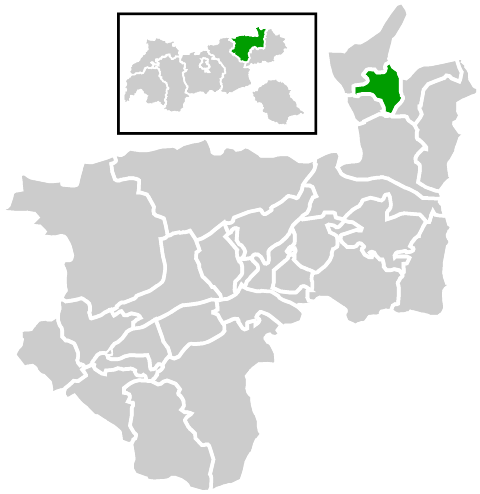 Lage der Gemeinde innerhalb des Bezirks Kufstein